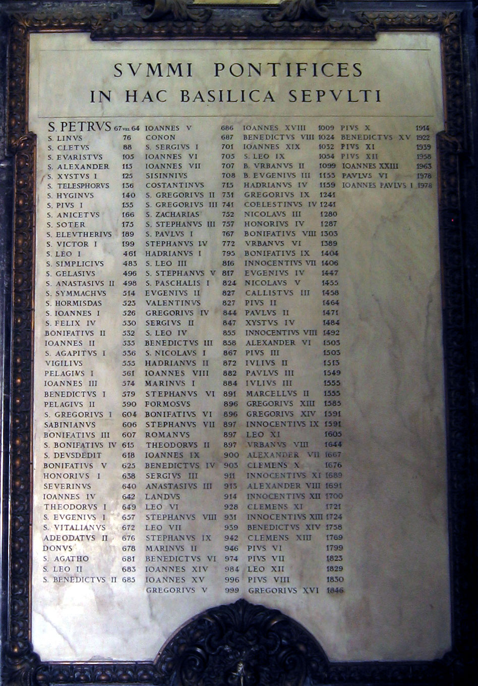 Tafel der im Petersdom bestatteten Päpste aus dem Petersdom in Rom, Italien